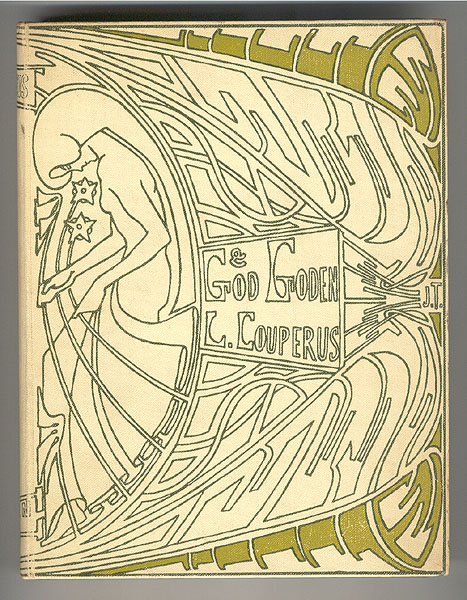 Boekomslag: God en goden. 1e druk 1903. Auteur: L. Couperus. Bandontwerp: J. Toorop. Uitgeverij: L.J. Veen